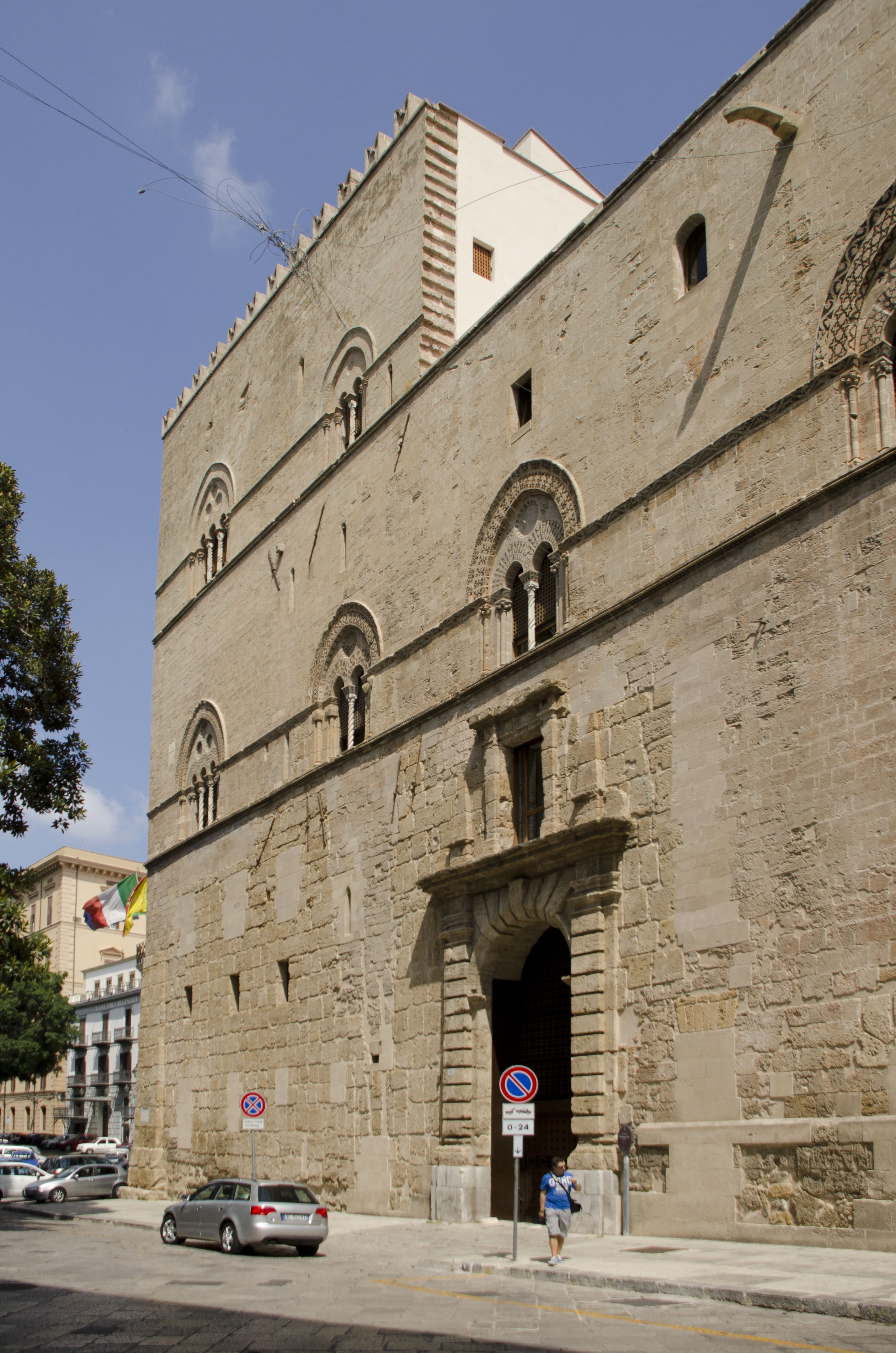 Palazzo Chiaramonte o Steri, Palermo, Sizilien